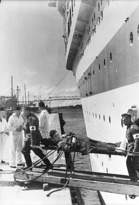 Scherl Bilderdienst Lazarettschiff "Wilhelm Gustloff" [in Kiel] Tausende von Verwundeten haben auf dem schönen Schiff, das in Friedenszeit den deutschen Arbeiter zu den Sehenswürdigkeiten der Welt führte, wohlbehütet durch Ärzte, Schwestern und Pflegern, die Rückfahrt aus Polen bzw. aus dem hohen Norden [Foto] in die Heimat unternommen. - Behutsam werden hier die Verwundeten nach der Ankunft im deutschen Heimathafen von Bord gebracht. PK - Augst 6581-40 , 3.8. 40 [Herausgabedatum]